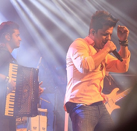 Cristiano Araújo, cantor sertanejo brasileiro, durante apresentação no Caldas Country, em Caldas Novas, GO.